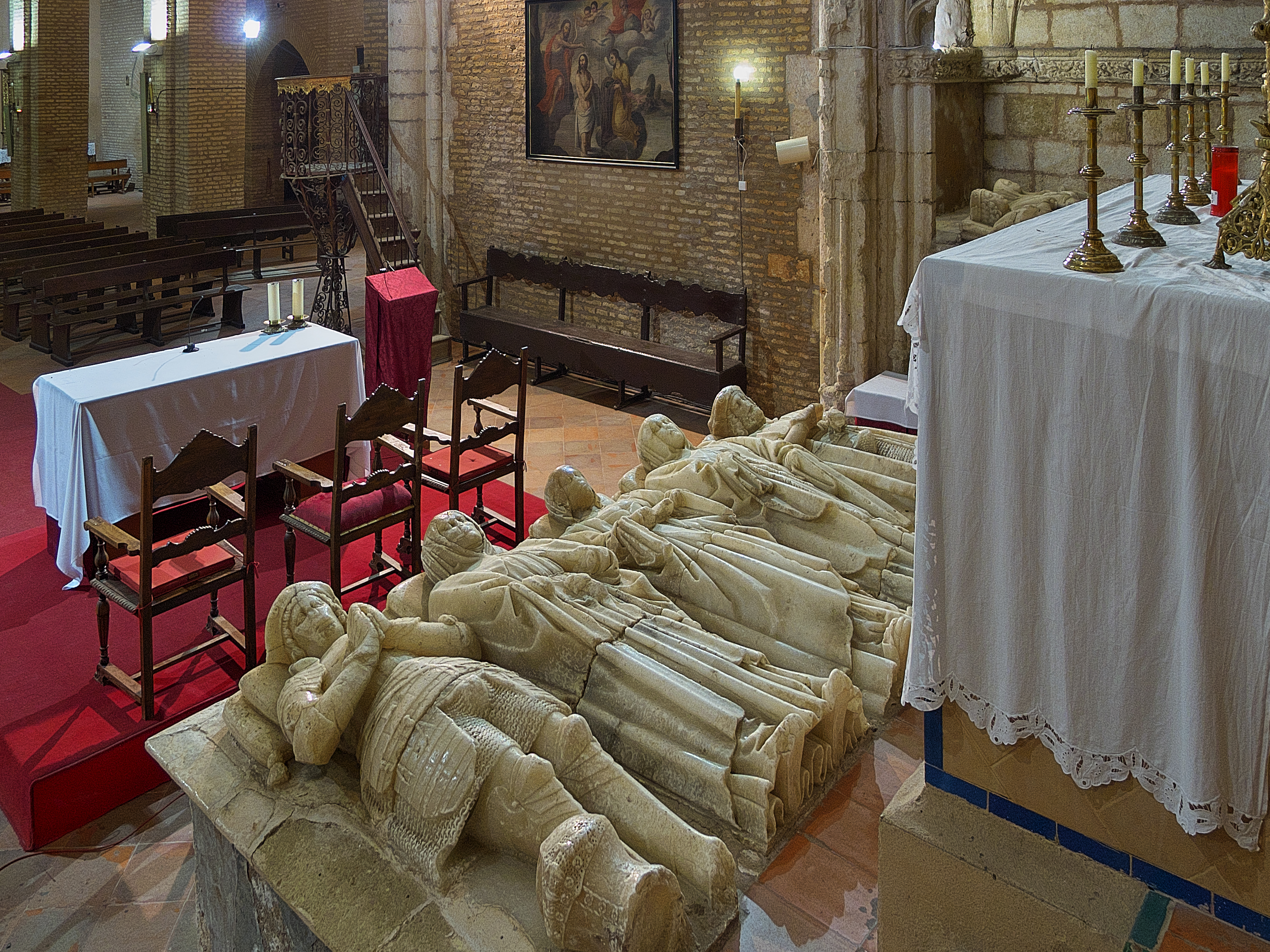 Monasterio de Santa Clara (Moguer), panteón de los Portocarreros